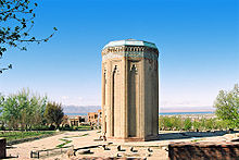 მე-12 საუკუნის ნაგებობა